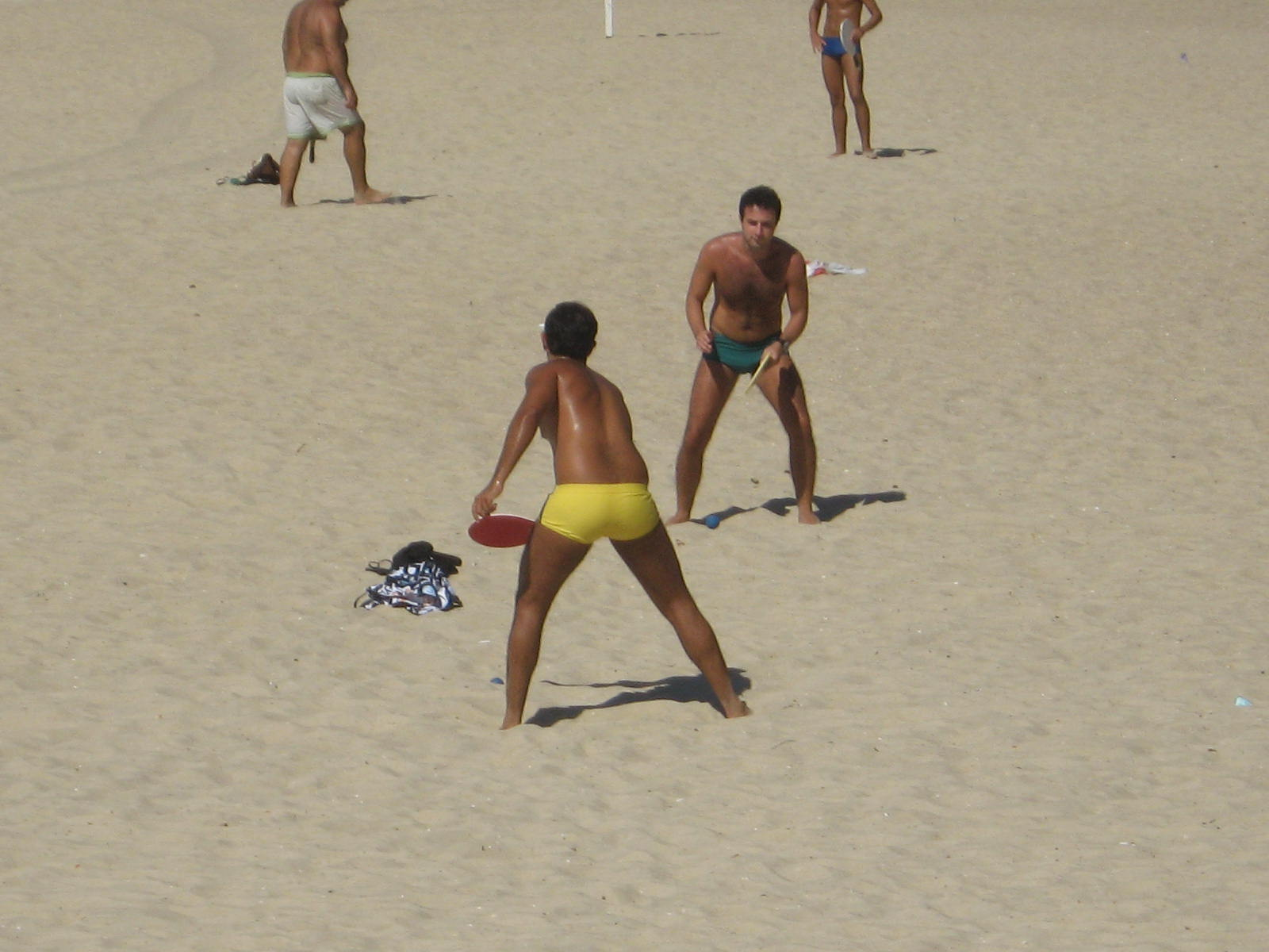 Jogo de frescobol na praia do Leblon, zona sul da cidade do Rio de Janeiro.